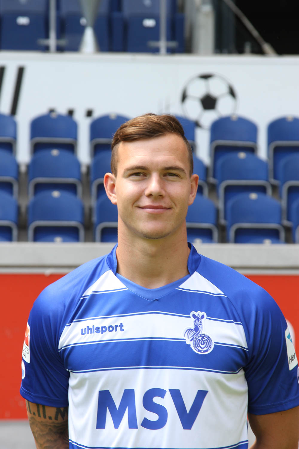 Kevin Scheidhauer 2015